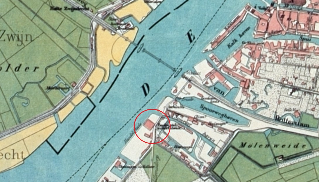 De afbeelding toont de locatie van de toenmalige suikerfabriek te Dordrecht